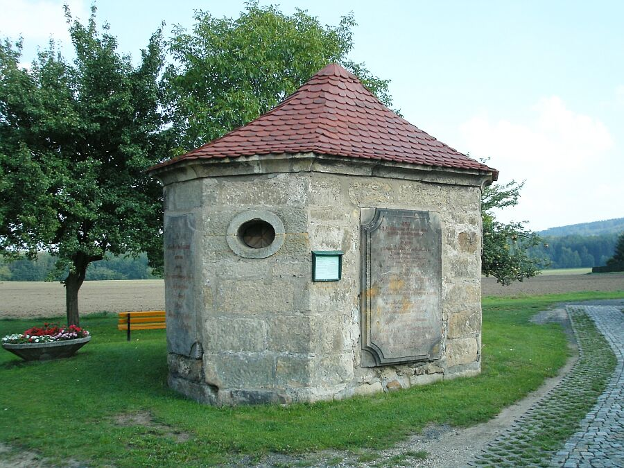 Rohrhaeusel, Hartau, Germany